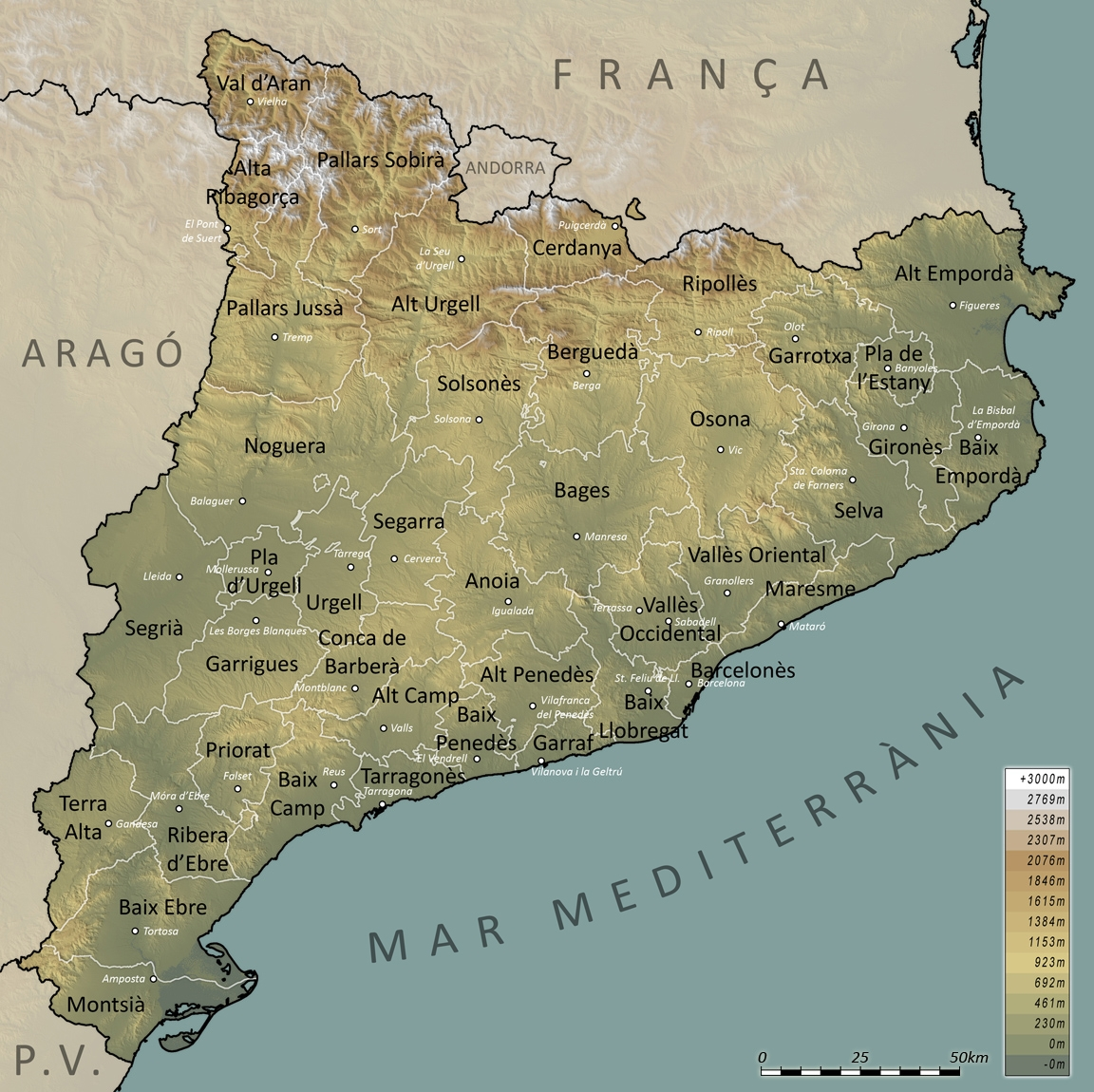 Mapa comarcal de Catalunya. Per Hansen